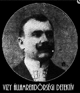 VIZY DETEKTÍV